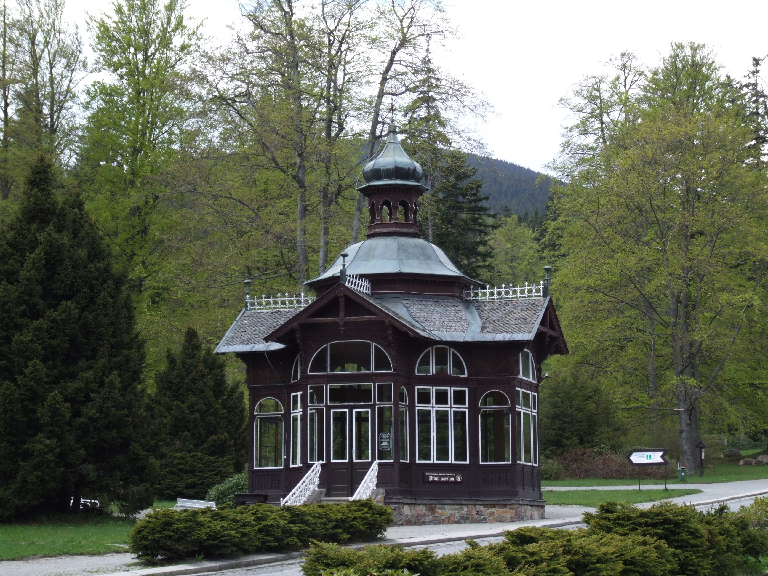 Karlova Studánka (Bad Karlsbrunn), Czech Republic